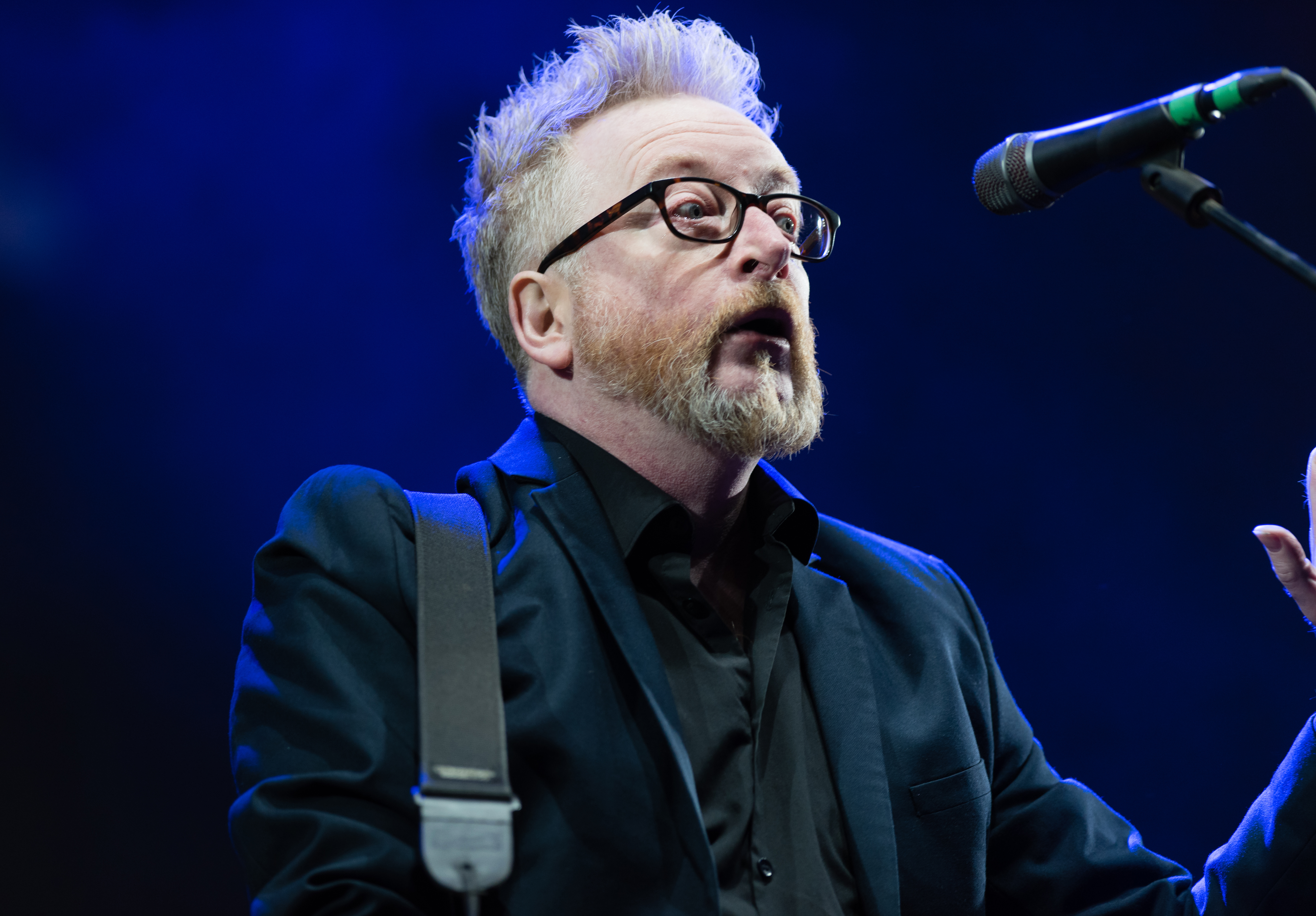 Flogging Molly live beim Reload Festival 2018